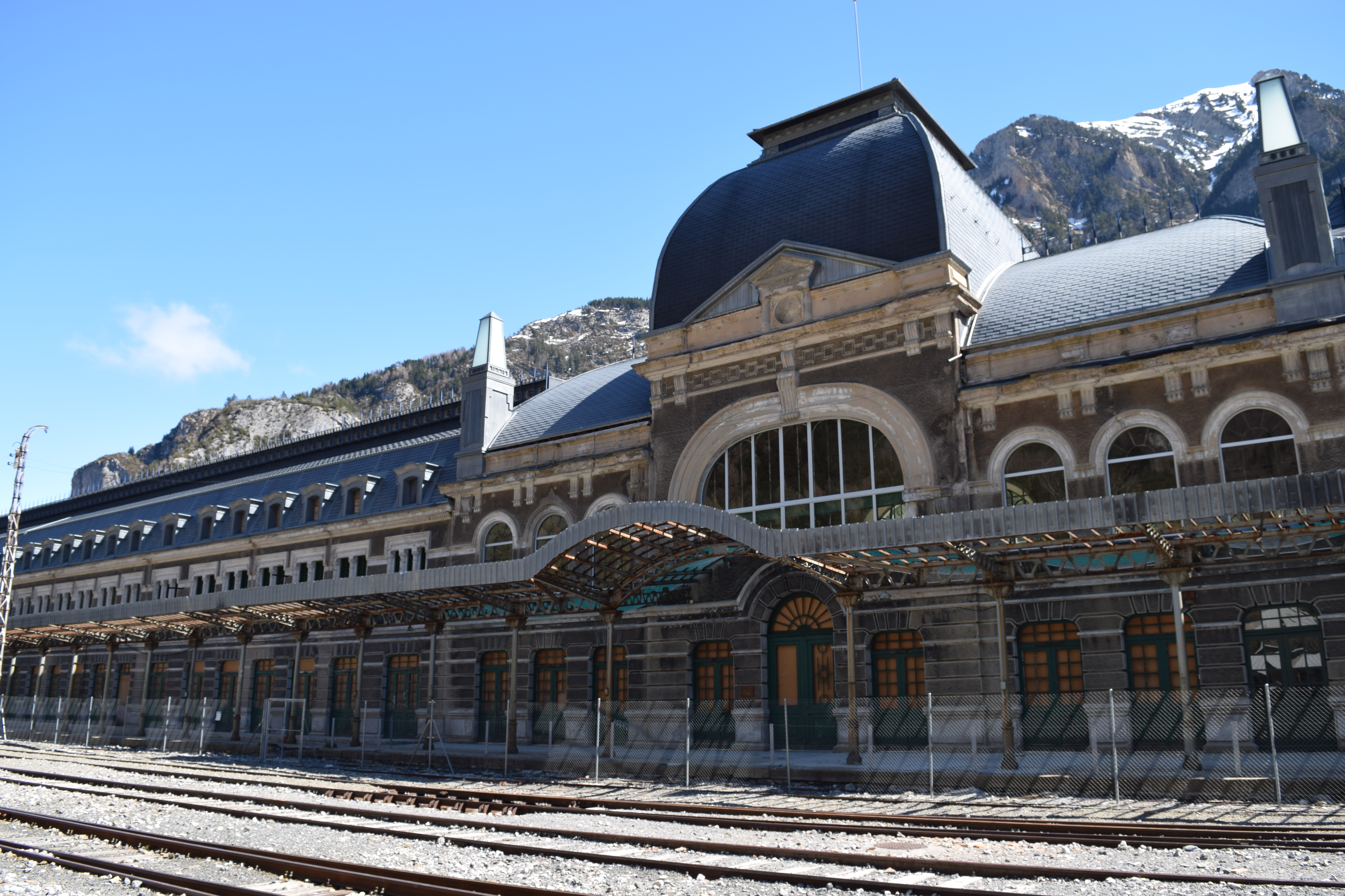 Vista del edifici de l'Estació Internacional de Canfranc, actualment en desús.